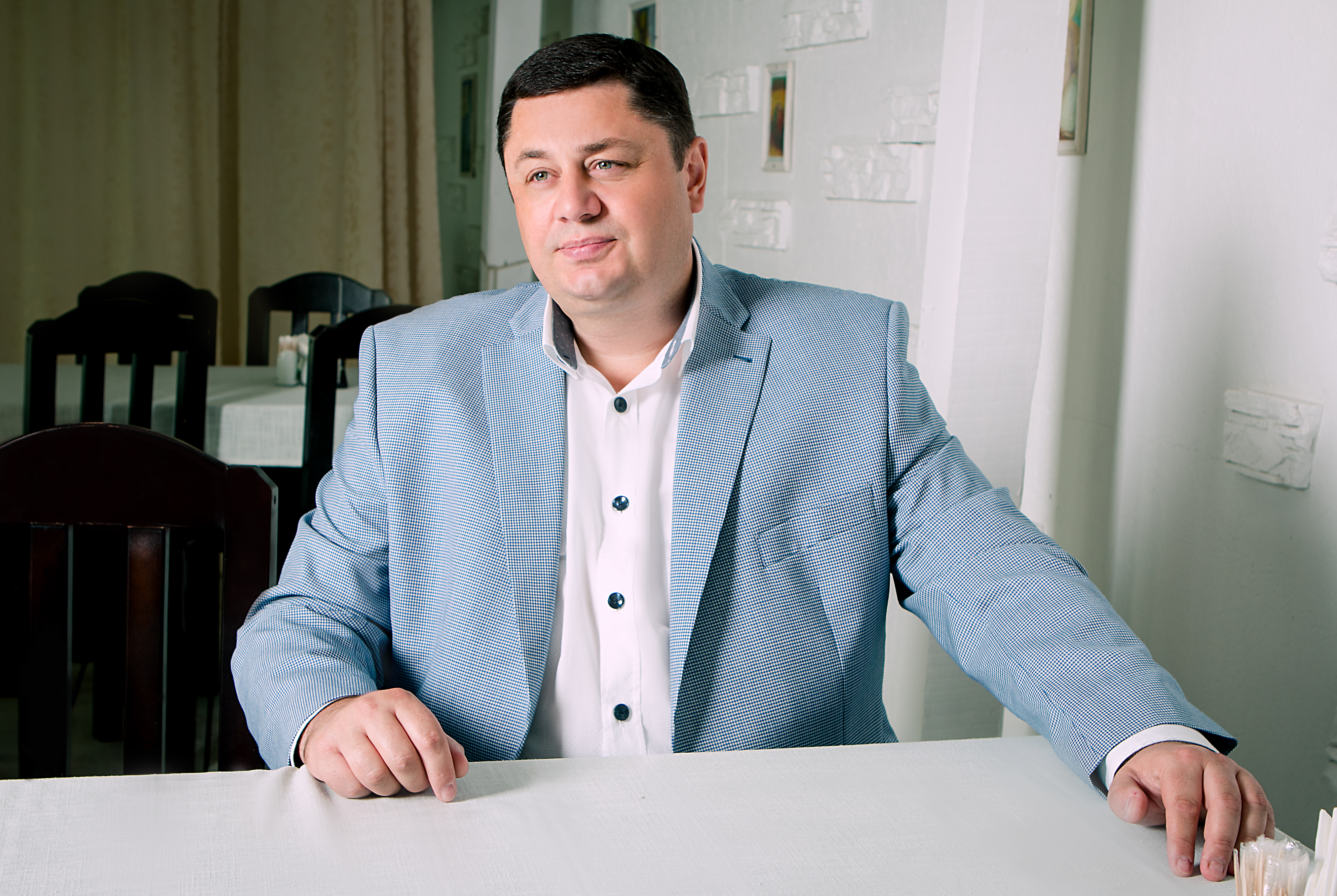 вчений, голова Федерації кікбоксингу України ISKA